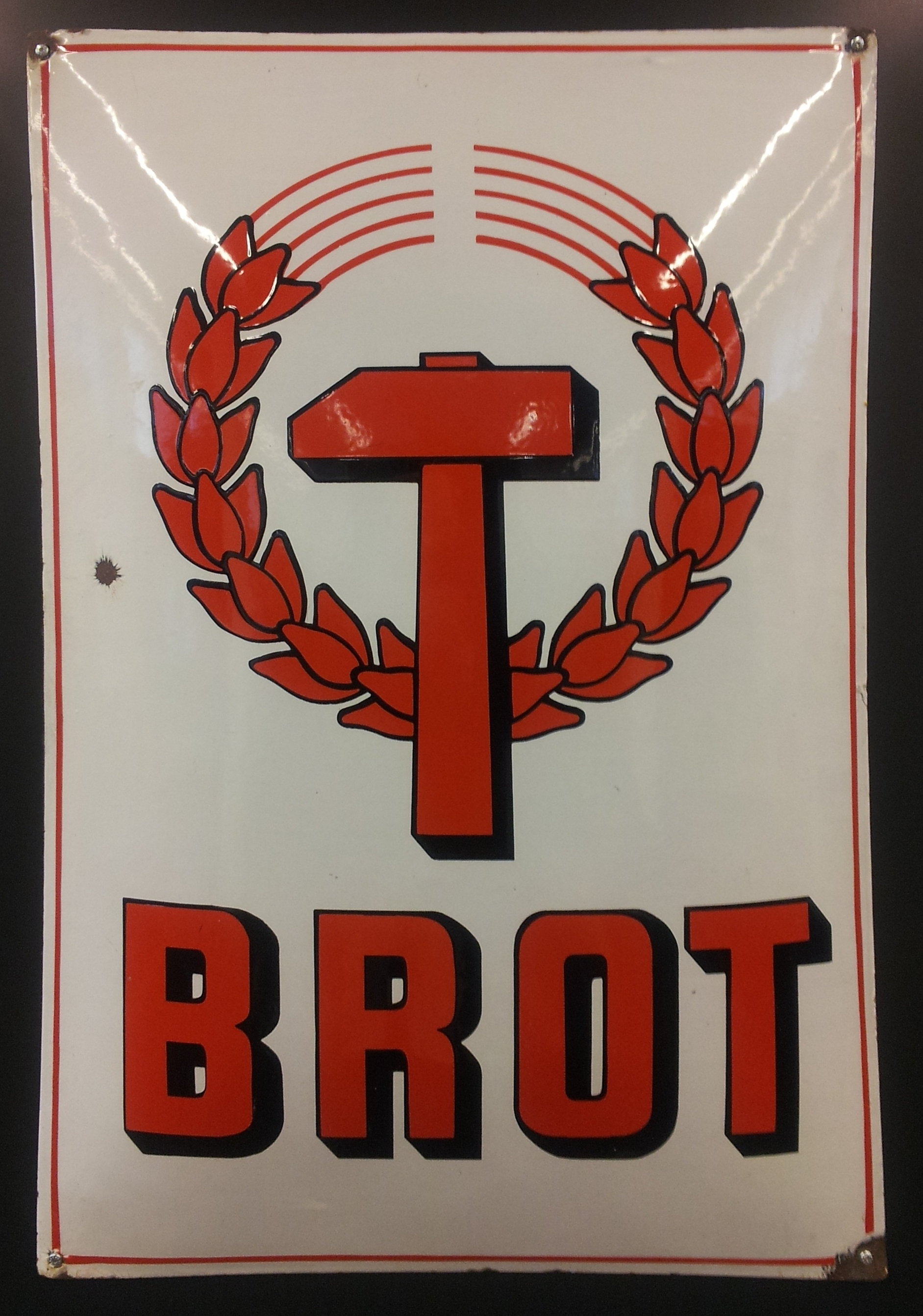 Karl-Marx-Hof - Waschsalon Dieses Bild wurde anlässlich des österreichischen Tags des Denkmals 2012 in Wien eingereicht.